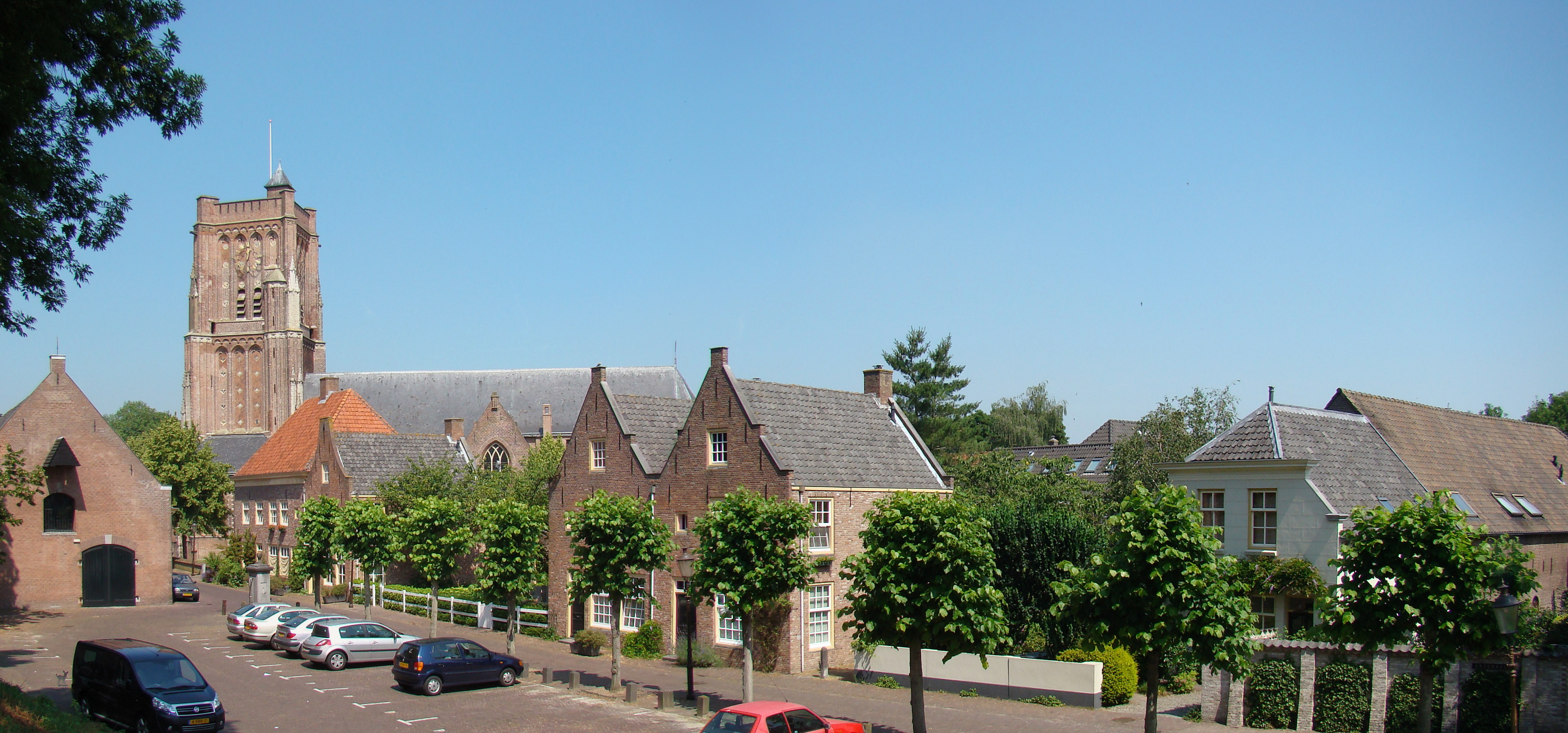 Zicht op een deel van de straat genaamd het Arsenaal met de Martinuskerk en (helemaal links) het visserijmuseum in Woudrichem